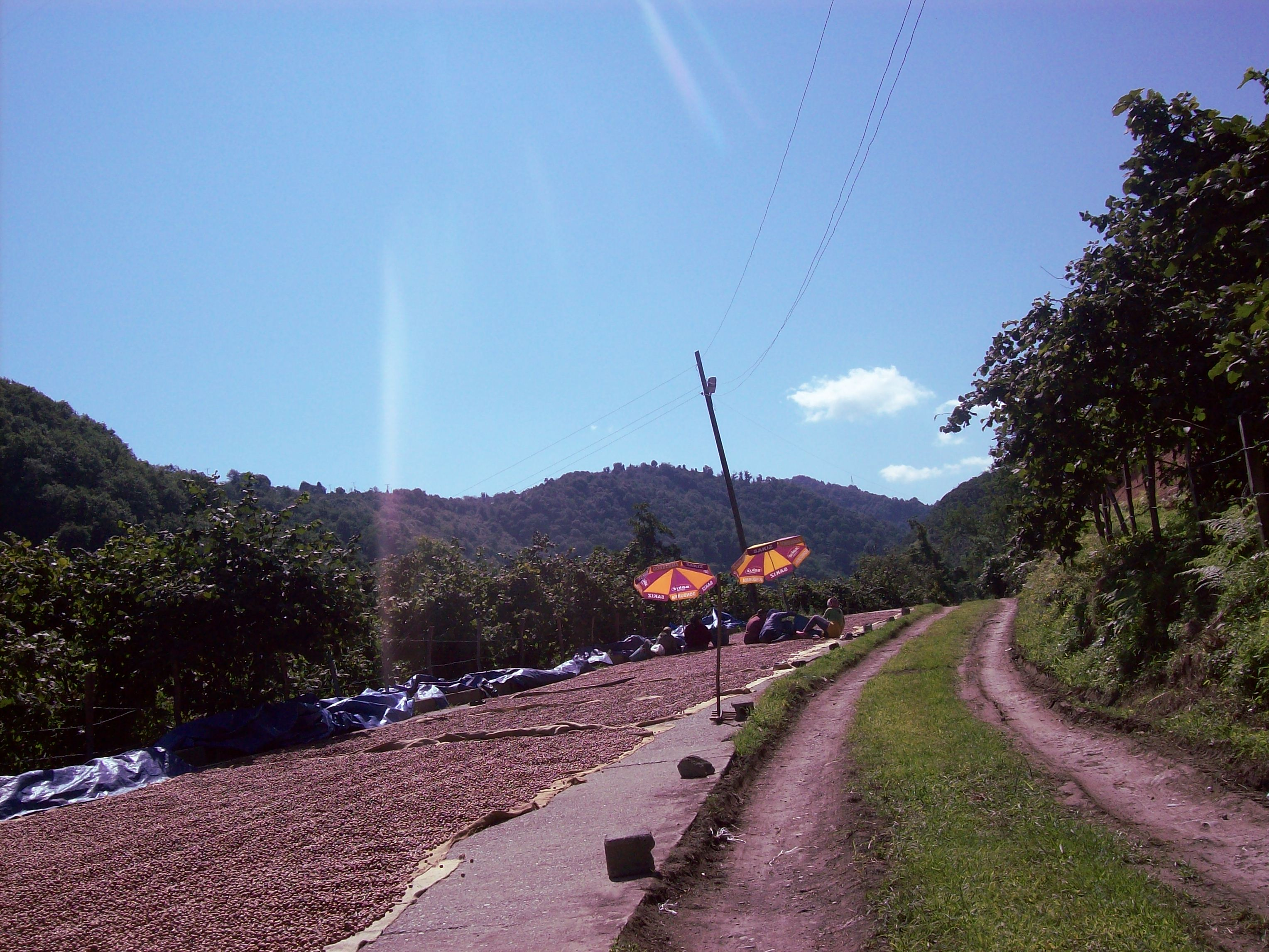 Giresun, Keşap Güneykoy Fındık Harmanı